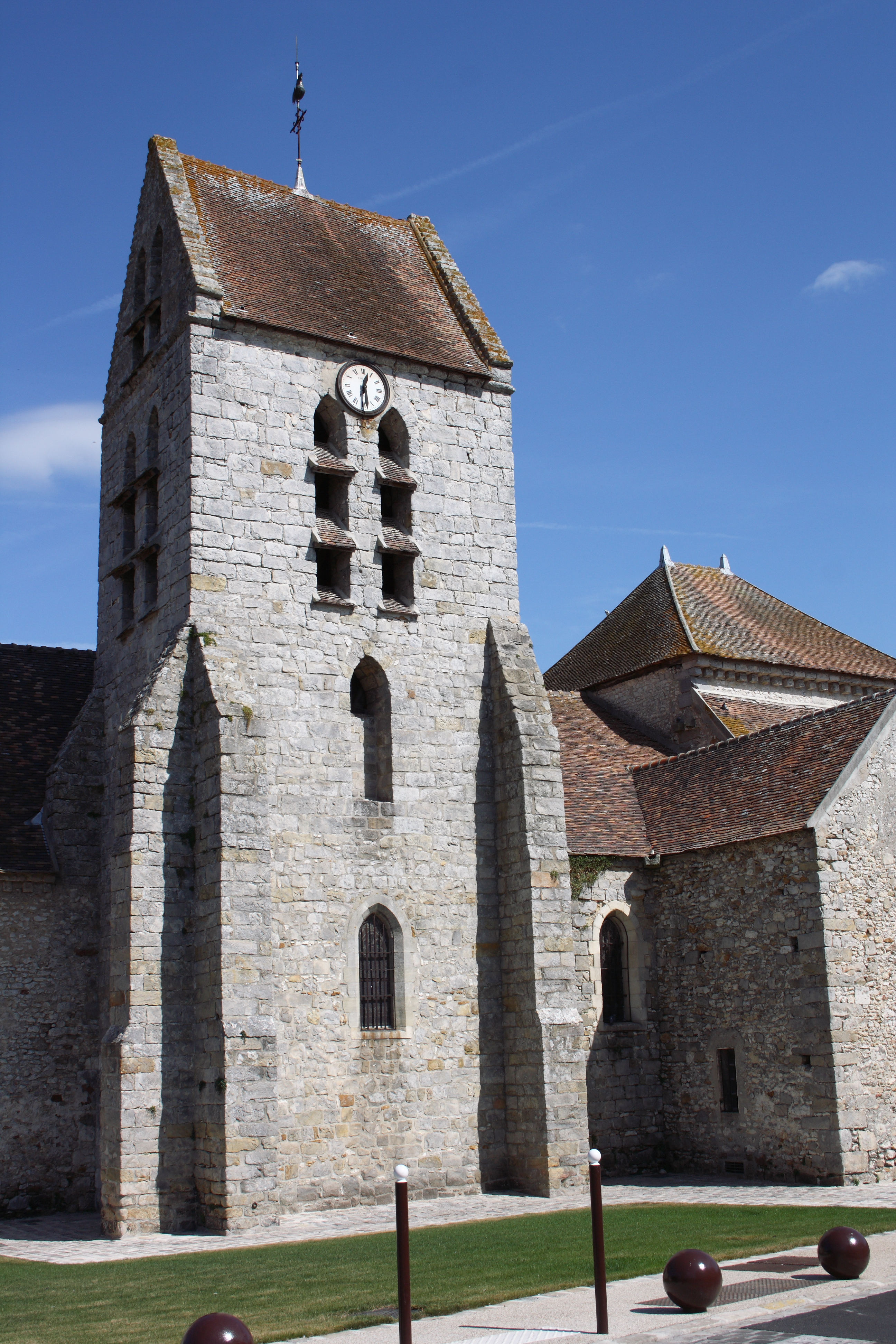 Katholische Pfarrkirche Saint-Pierre in Avon im Département Seine-et-Marne in der Region Île-de-France (Frankreich), Glockenturm Object location48° 24′ 18.72″ N, 2° 43′ 15.96″ E